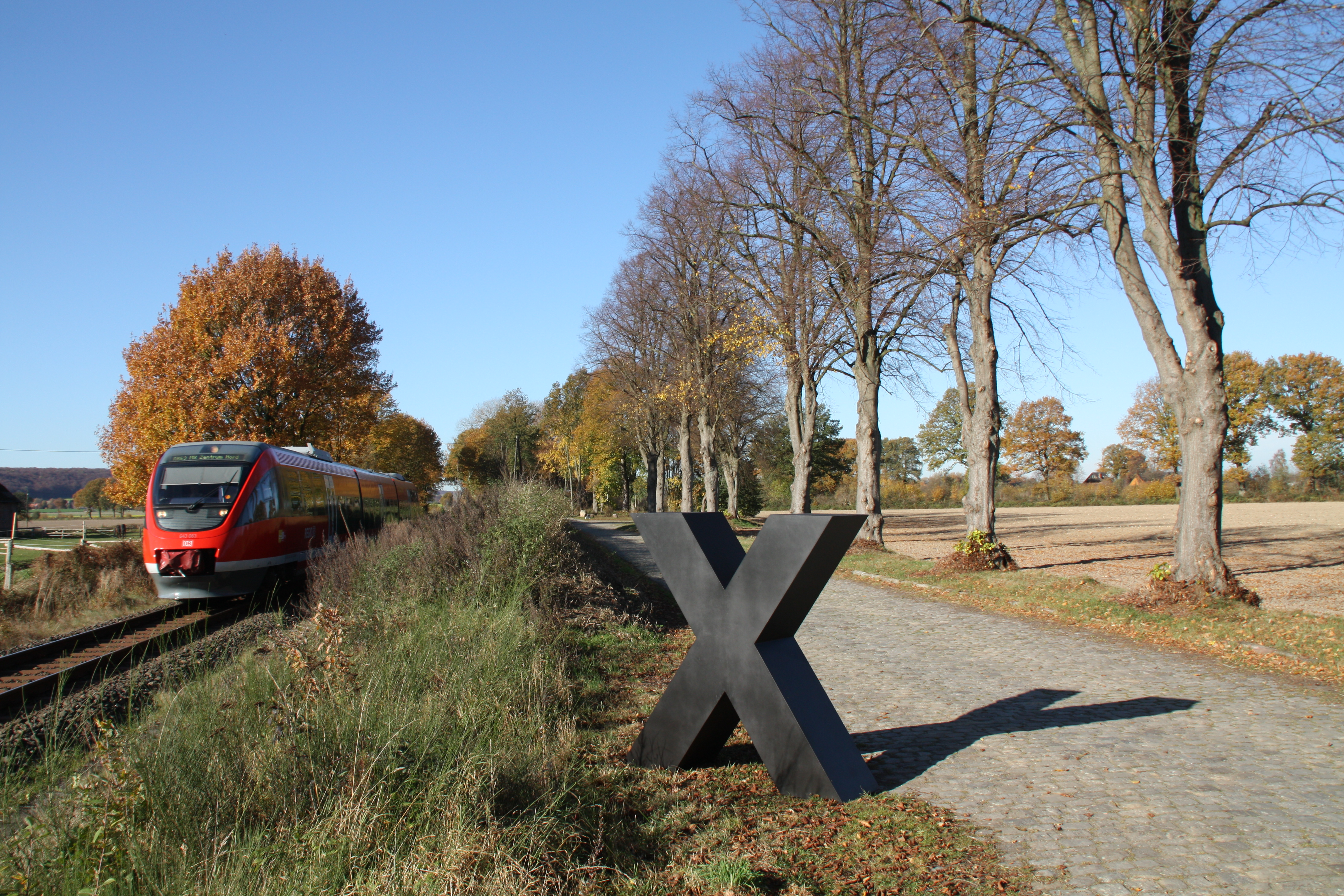 Das x in Aktion am ehemaligen Bahnhof Tilbeck.